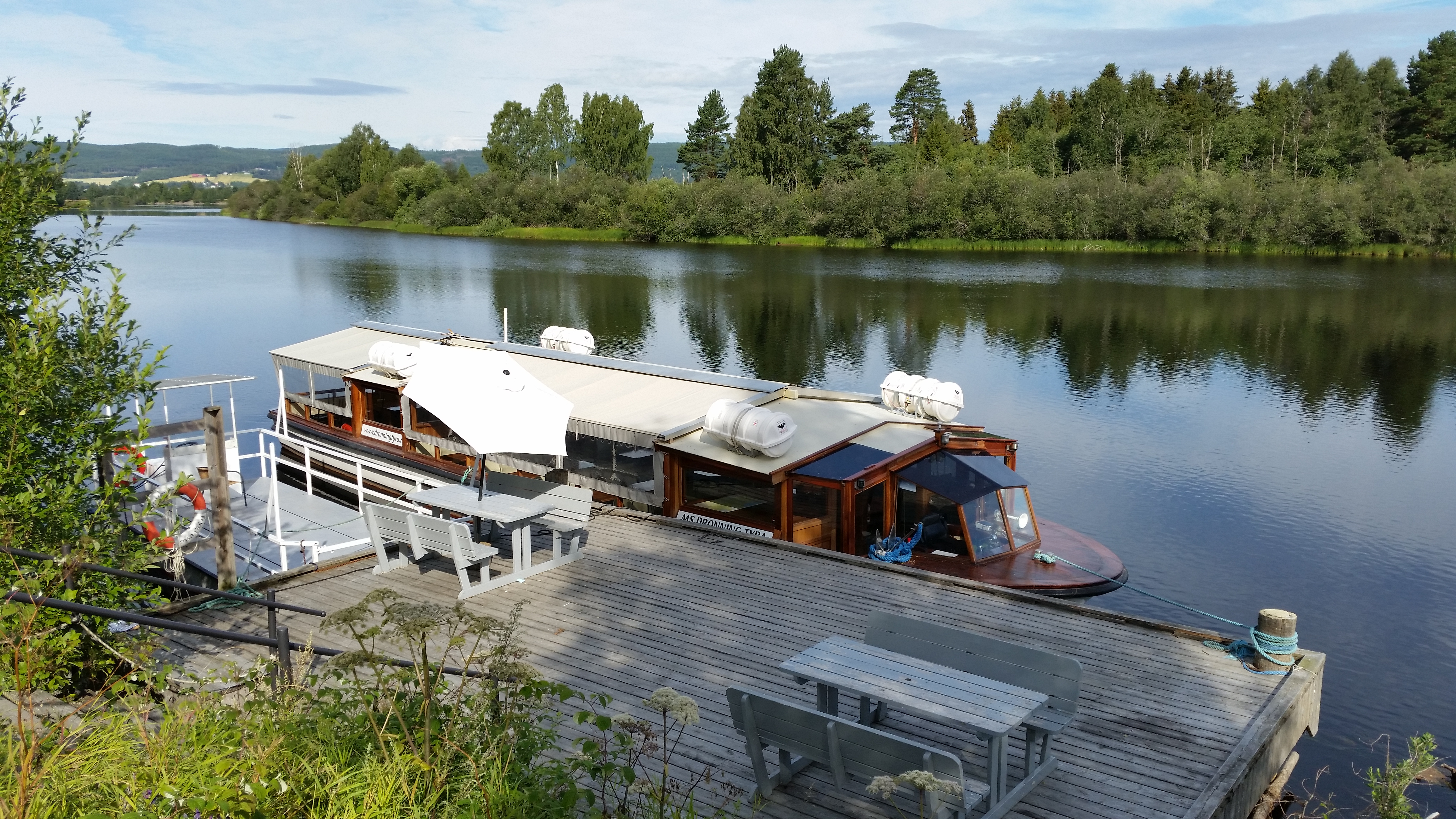 Elvebåt, Tyrifjorden og Storelva (Begna), Ringerike og Hole kommuner